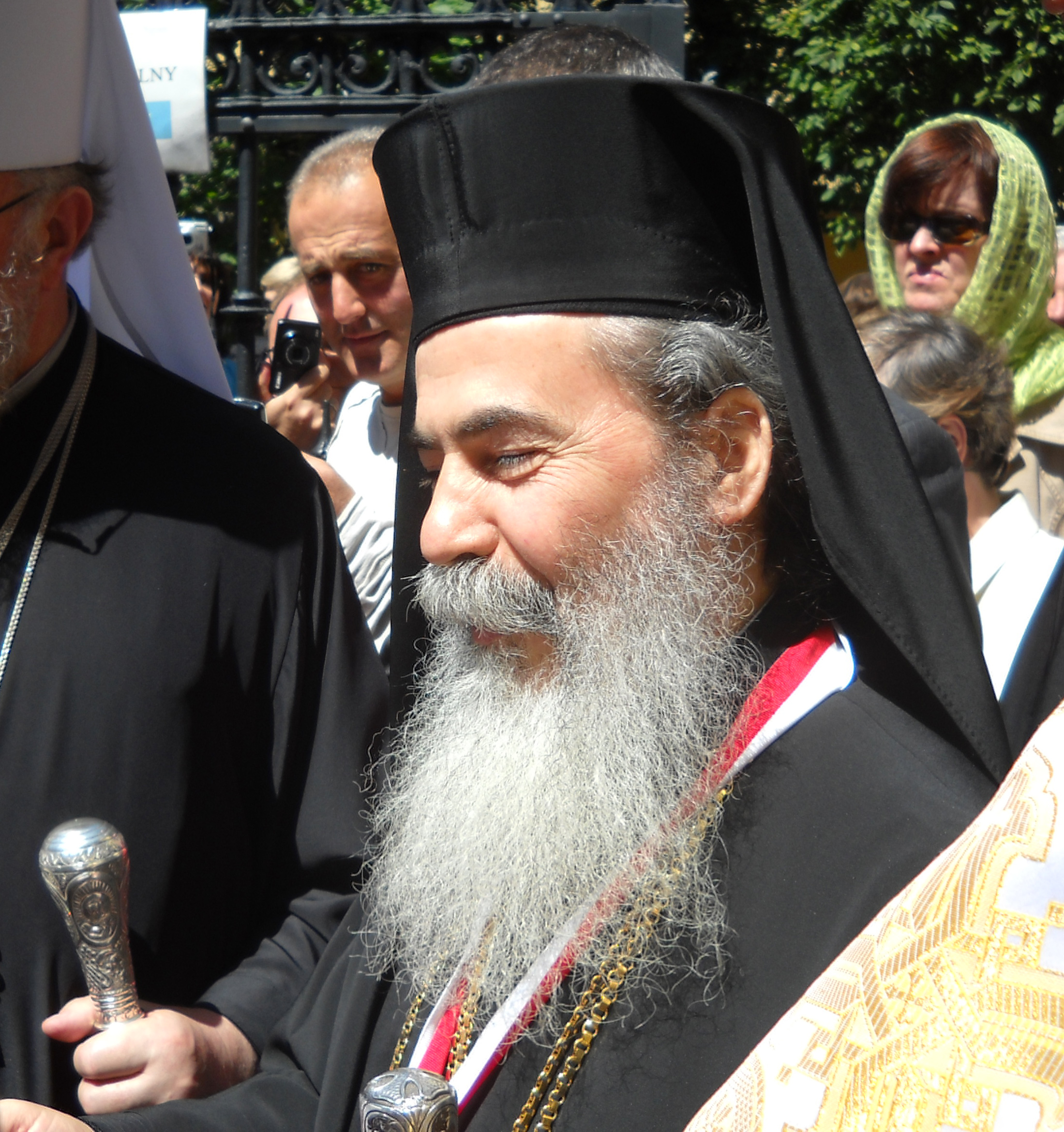 Metropolita warszawski i całej Polski Sawa oraz patriarcha jerozolimski Teofil III opuszczają sobór w Warszawie po Świętej Liturgii, 27 czerwca 2009